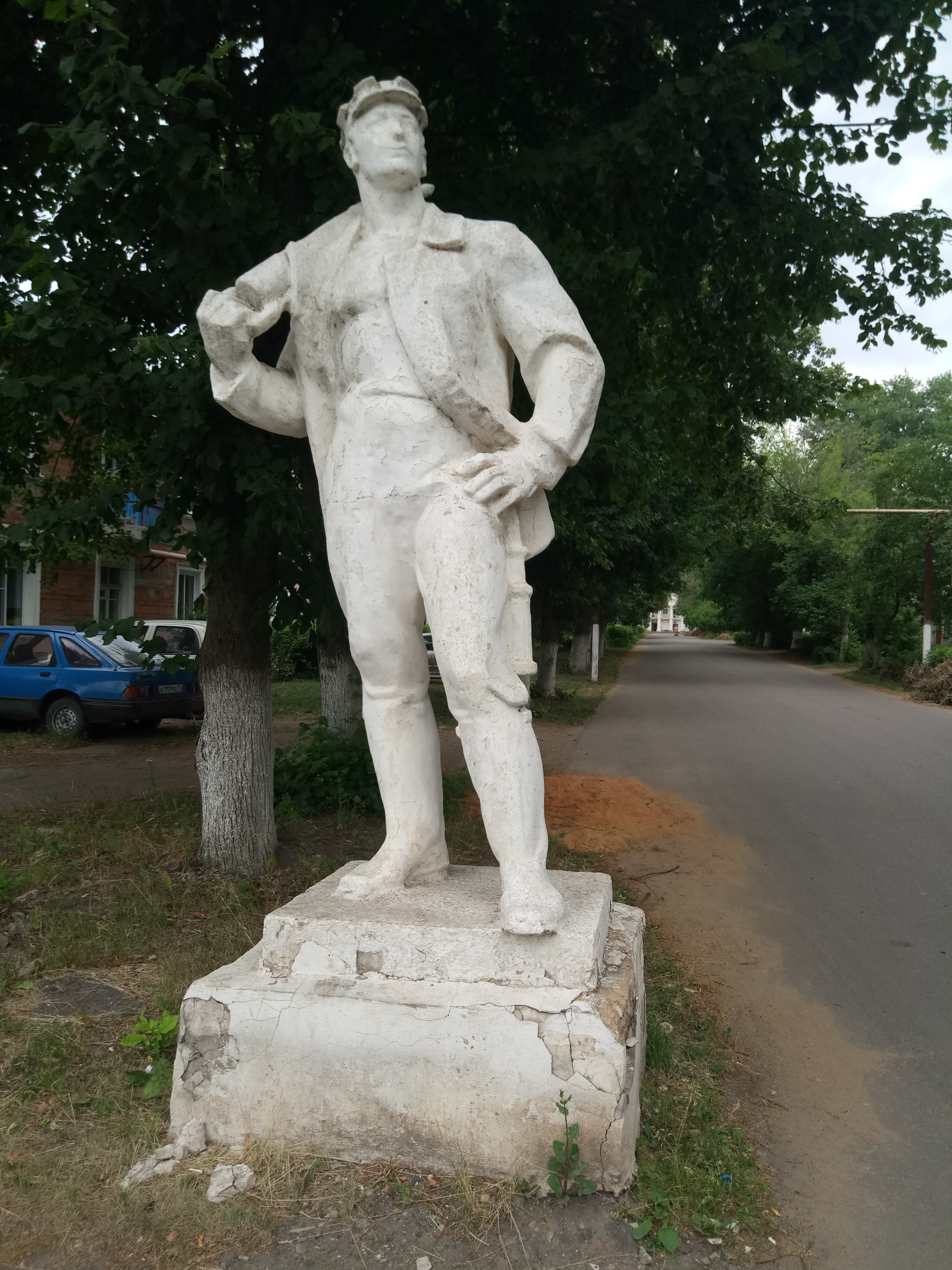 Памятник шахтёру, п. Комсомольский, Тульская обл.